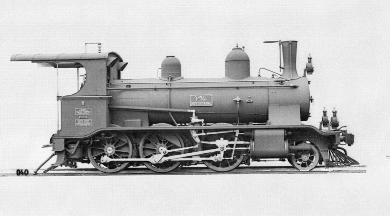 3/4 gekuppelte 2 Zylinder-Lokomotive Nr. 8 „Hippopotame“für die Äthiopischen Bahnen. Werksbild der Schweizerische Lokomotiv- und Maschinenfabrik